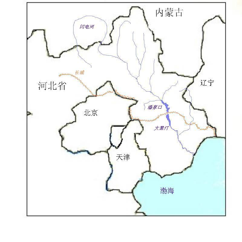 滦河流域图